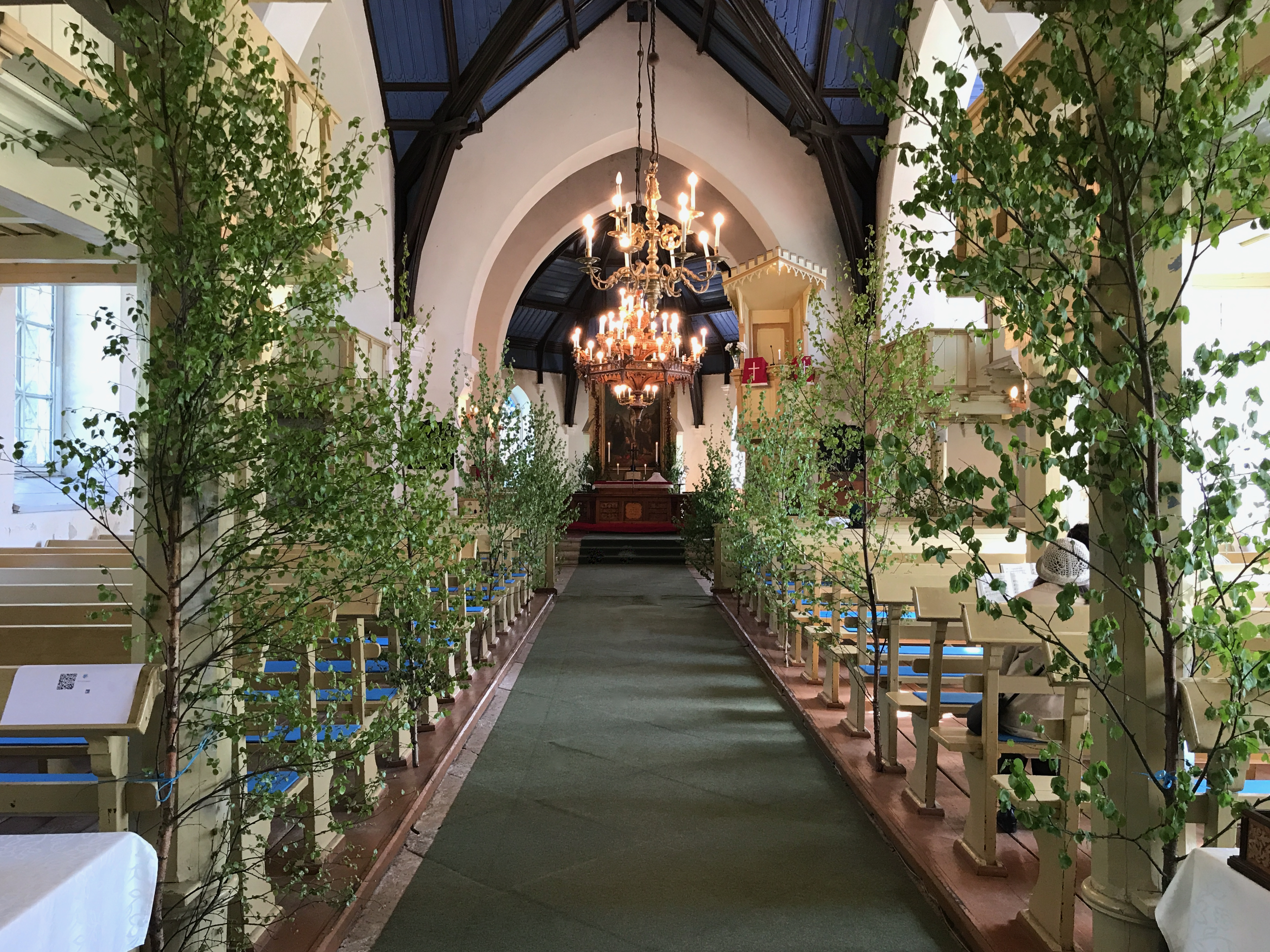 Jüri kiriku sisevaade altari suunas